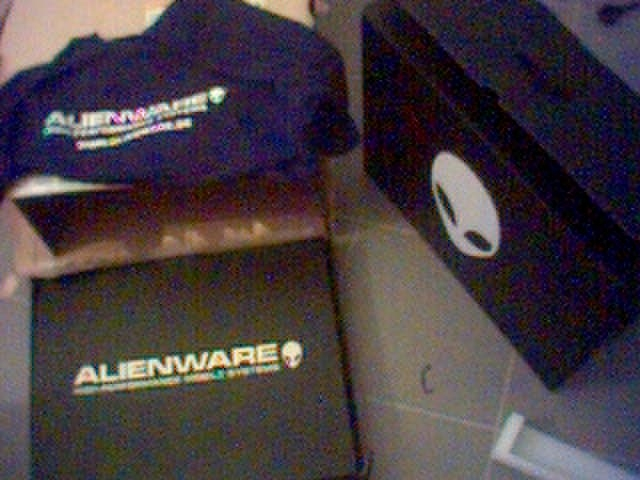 Po?iljka iz Alienware tvrtke, nakon osvojene nagradne igre sponzorirane od strane Microsoft-a. (godina 2007.) Autor ove slike je ujedno i autor ?lanka "Alienware" hrvatske wikipedije.